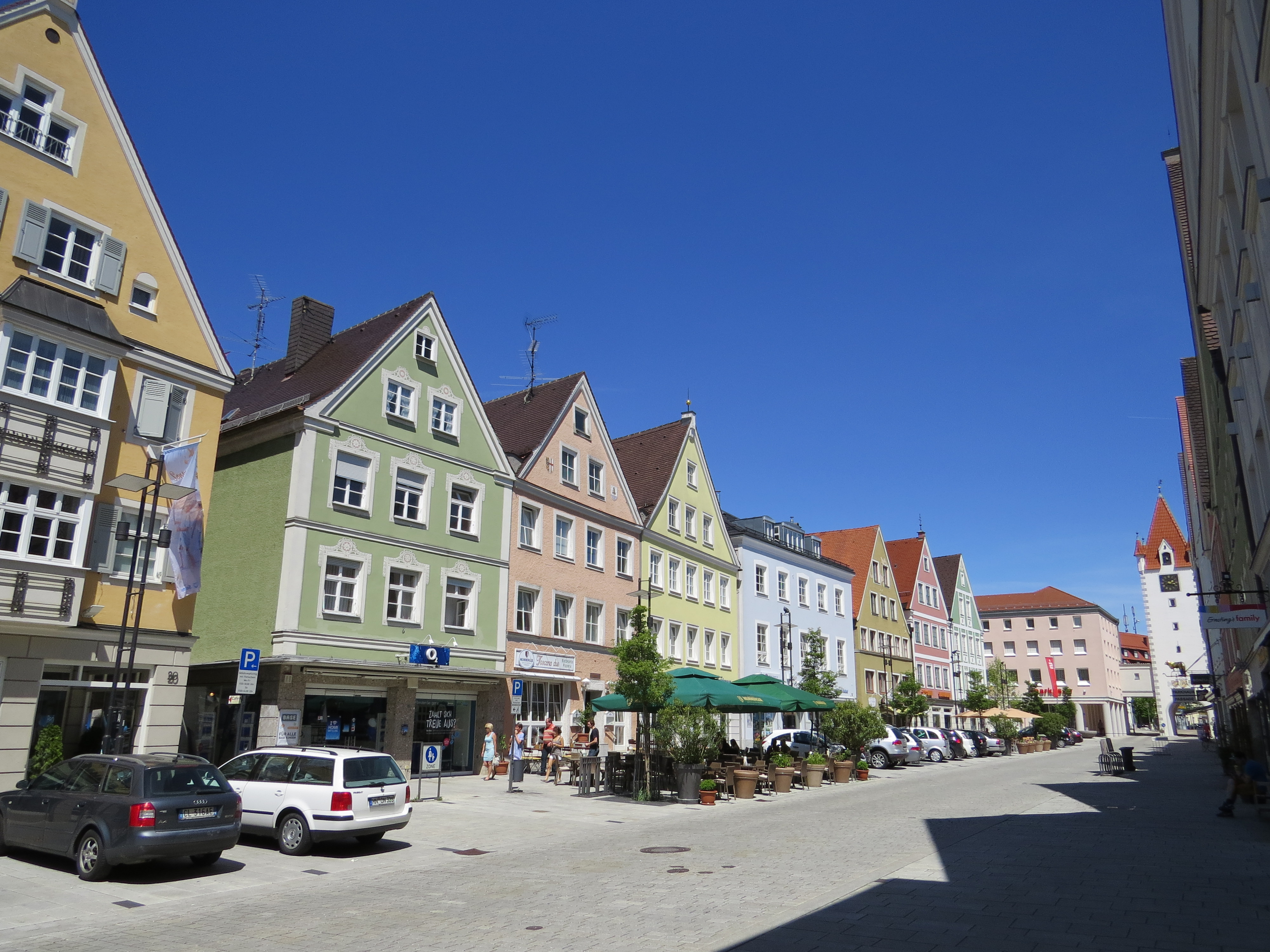 Maximilianstr. in Mindelheim